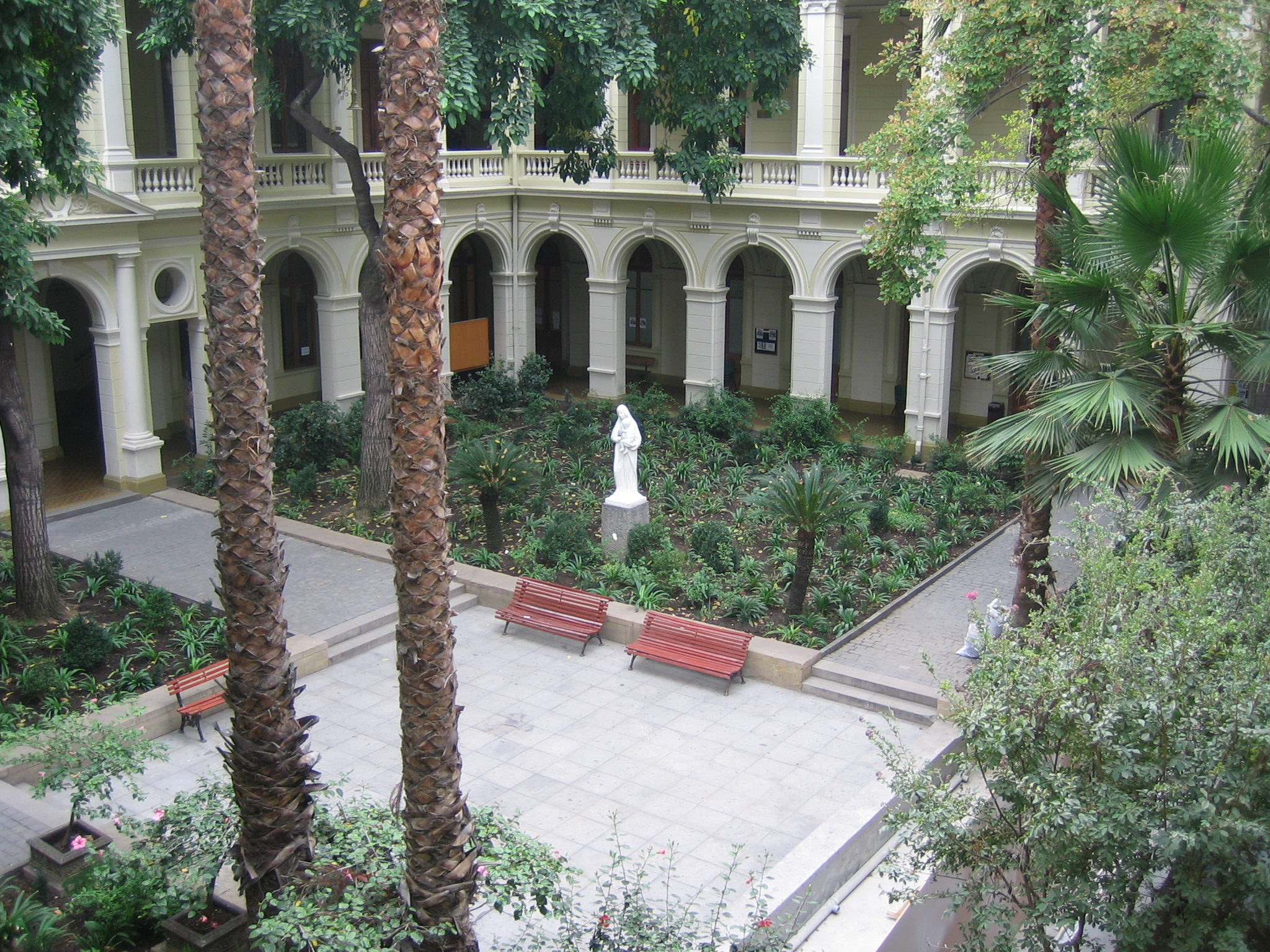 Von mir im März 2004 aufgenommen und unter public domain gestellt.